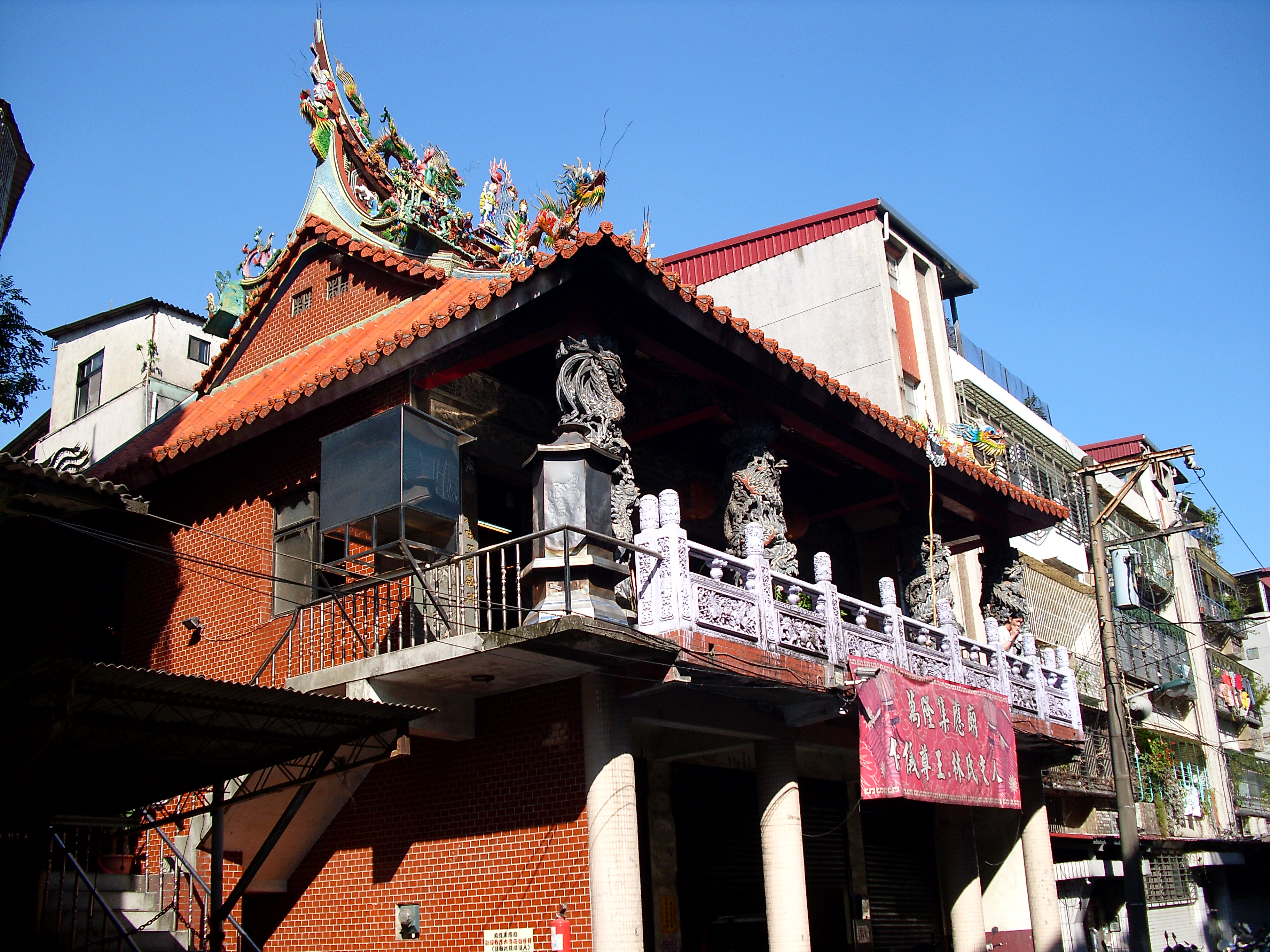 Bân-lâm-gú: 萬隆集應廟，佇臺北市。